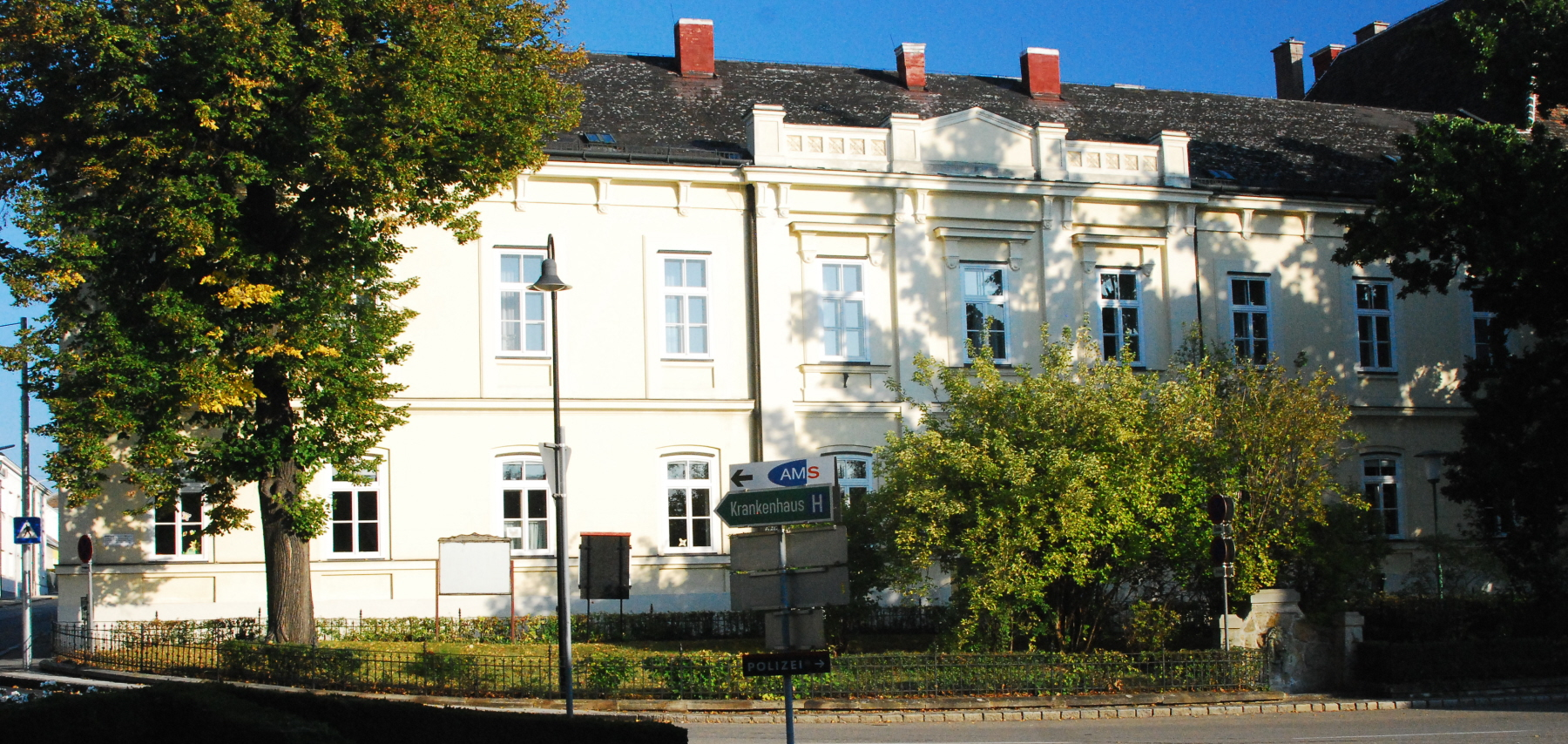 Amtsgebäude, Gerichtsgebäude